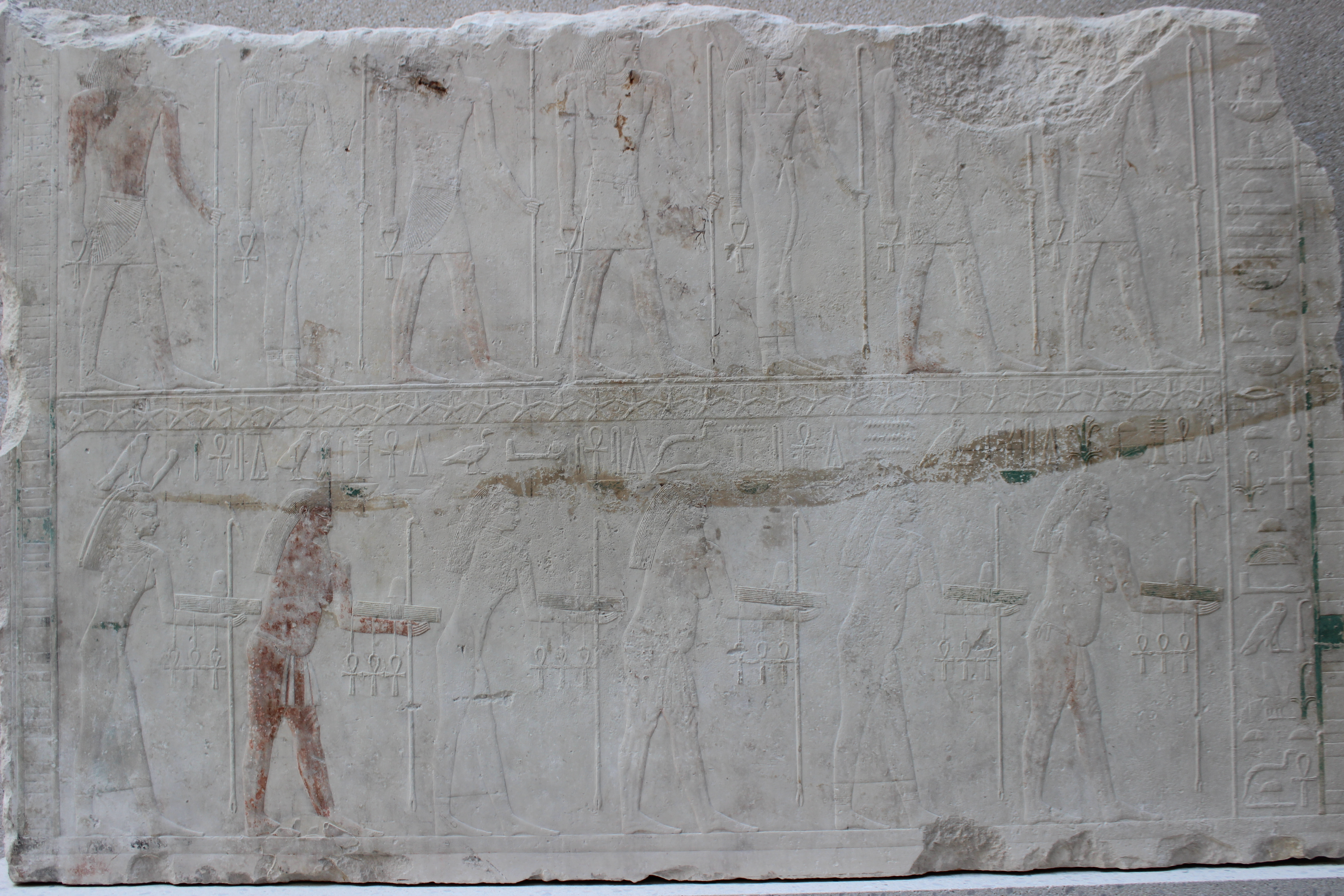 Berlín. Neues Museum. Relieves del templo funerario del faraón Sahure (V d.).